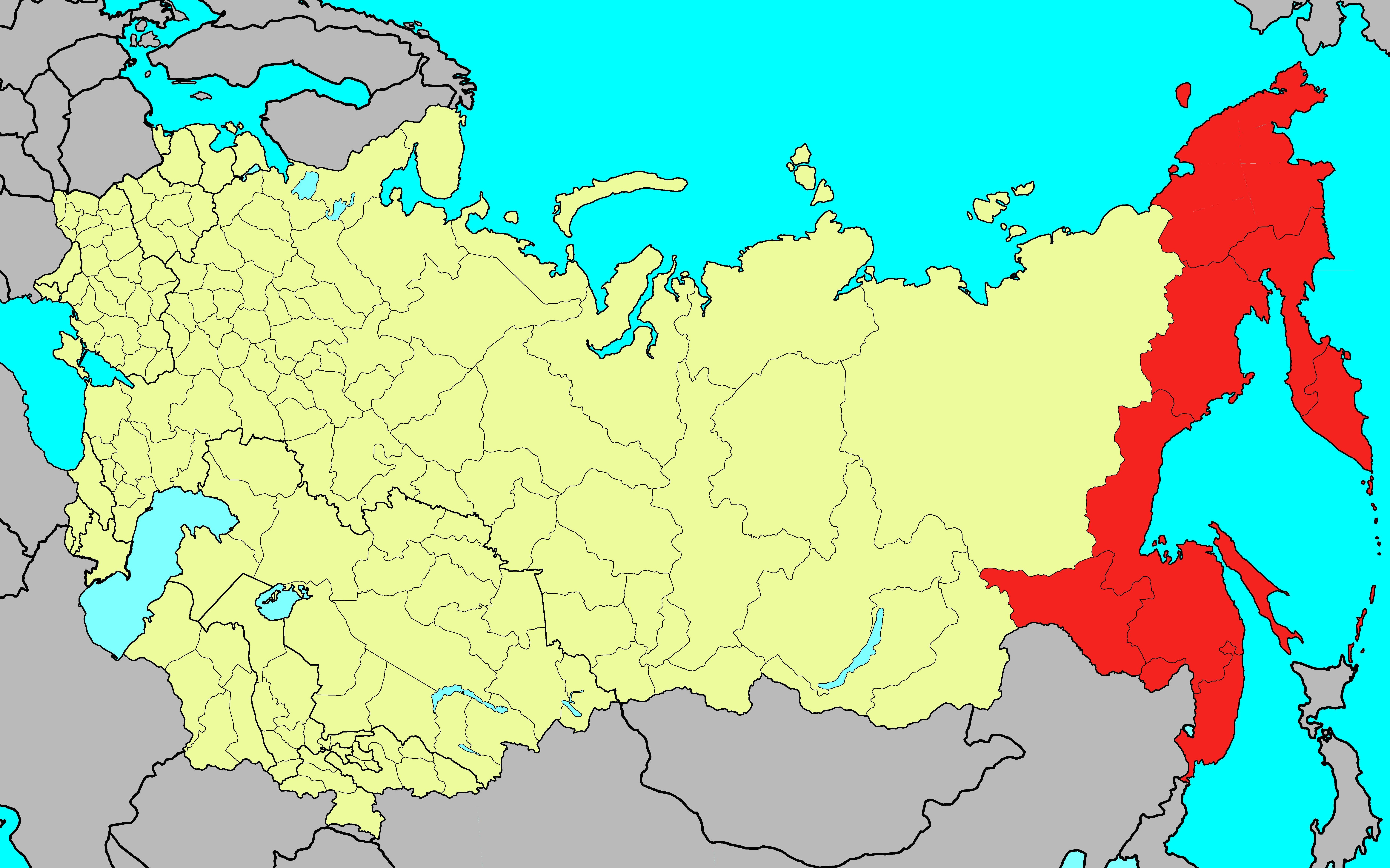 Дальневосточный военный округ ВС СССР на 1991 год